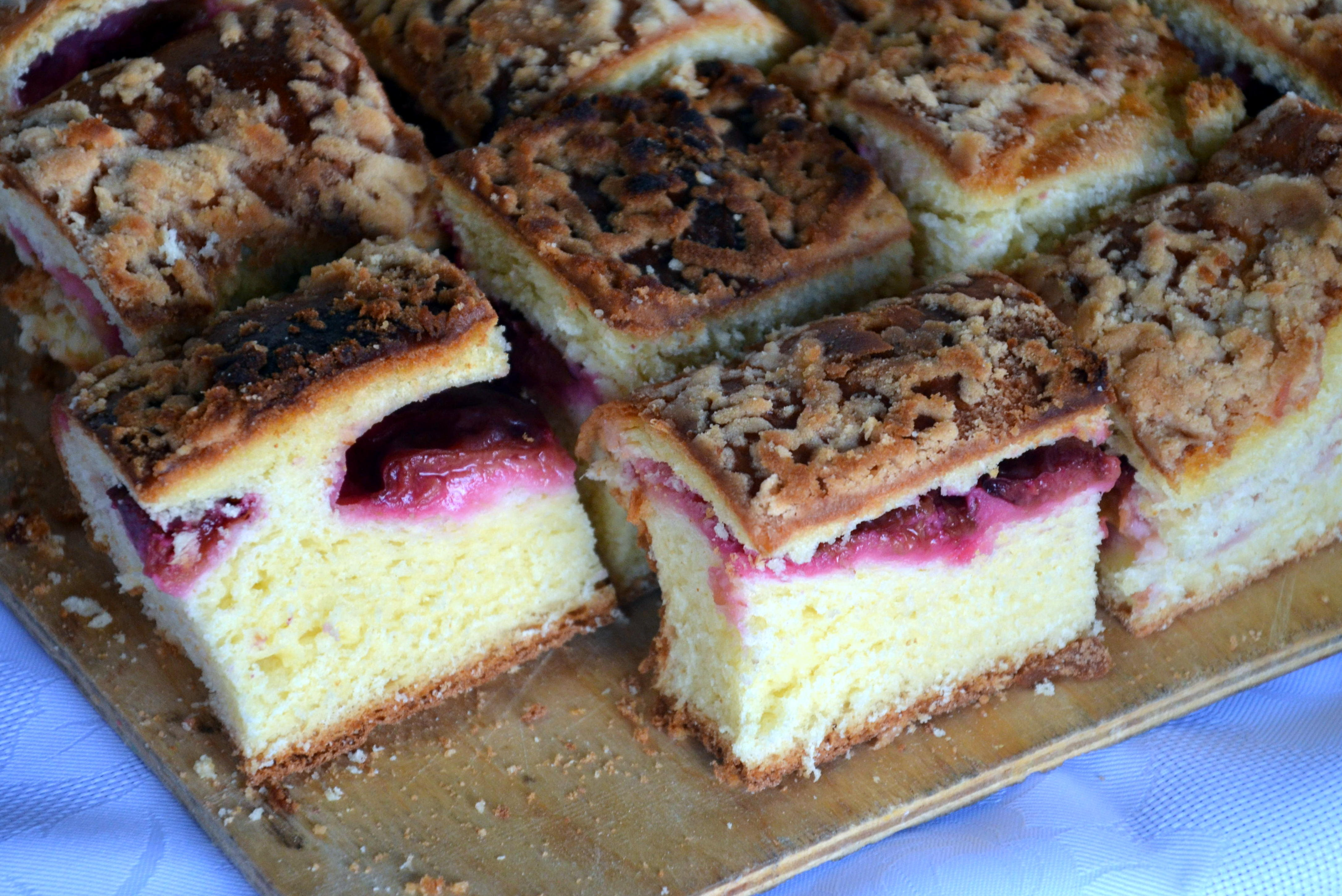 Beskidische Kuchen